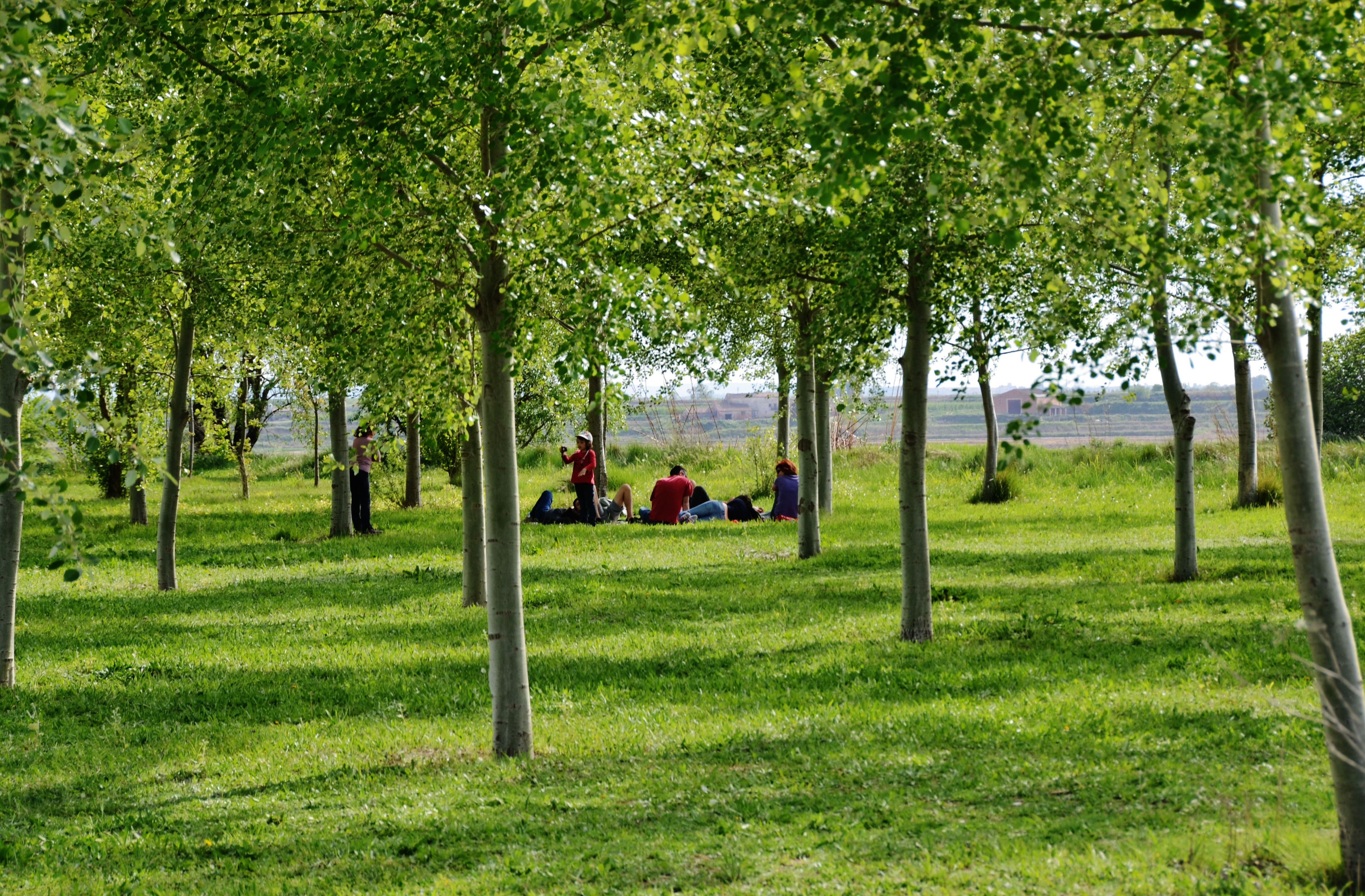 Estany d'Ivars i Vila-sana This is a a photo of a natural area in Catalonia, Spain, with id: ES510252